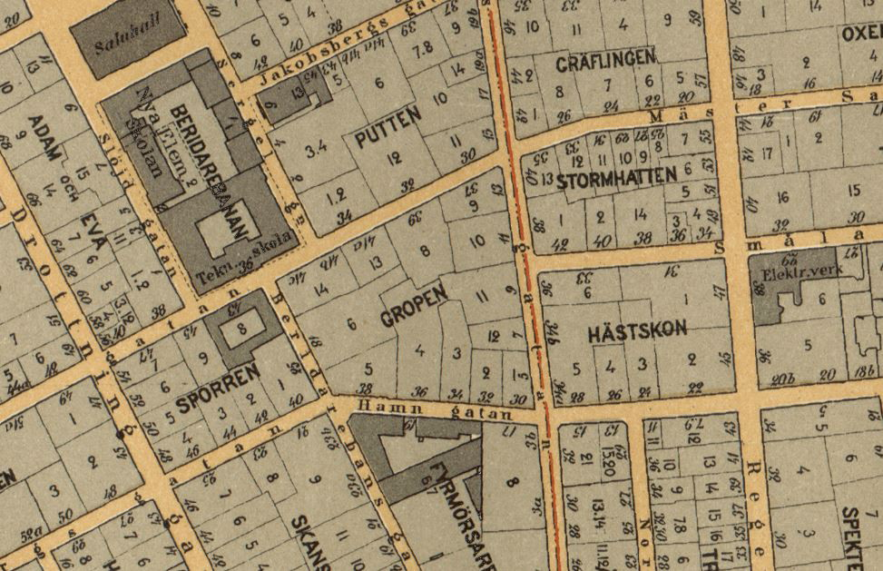 Karta över Stockholms innerstad med kvarteret "Gropen" i mitten, idag plats för Sergels torg.